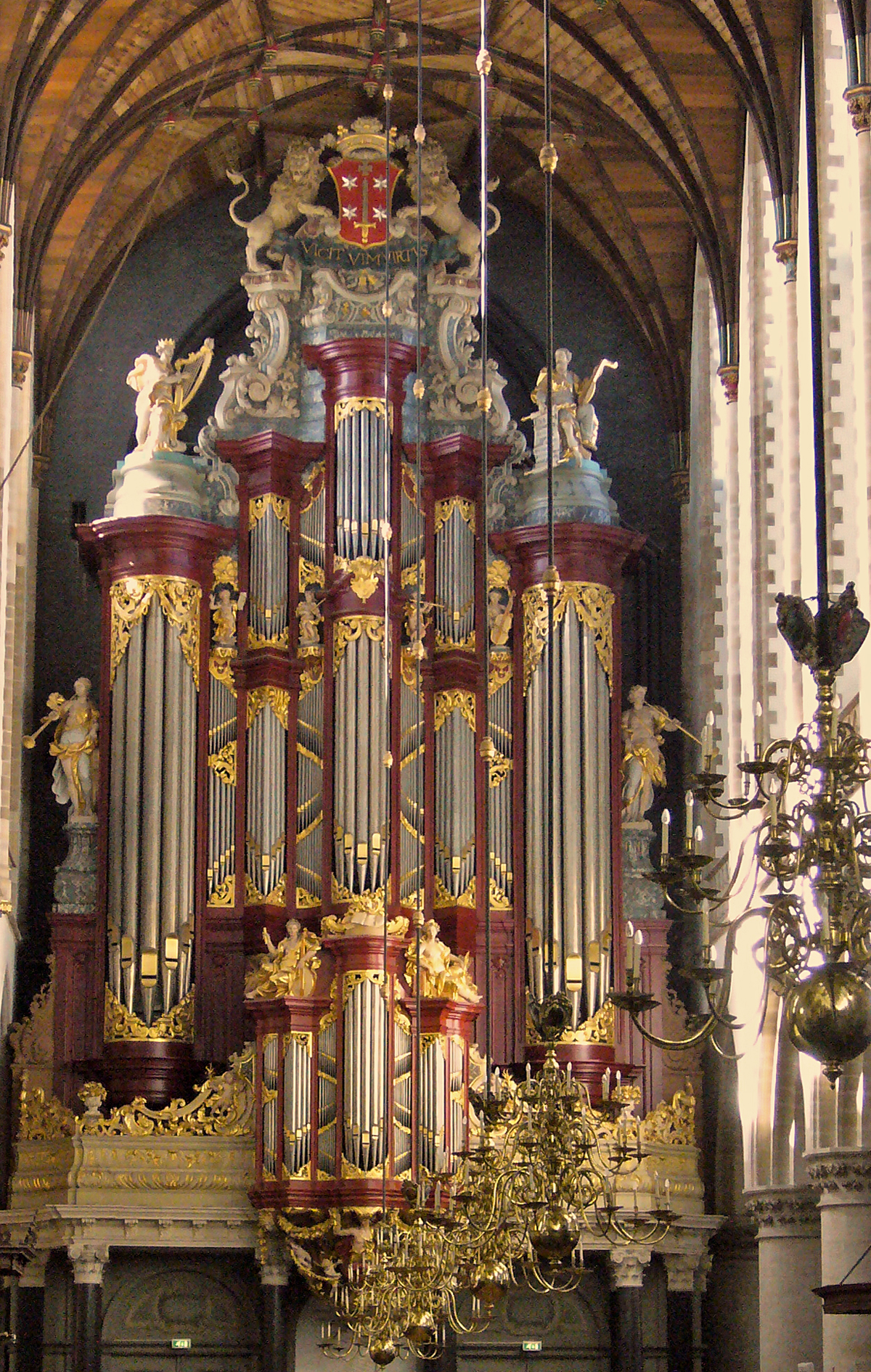 Orgelfront in de St Bavo te Haarlem